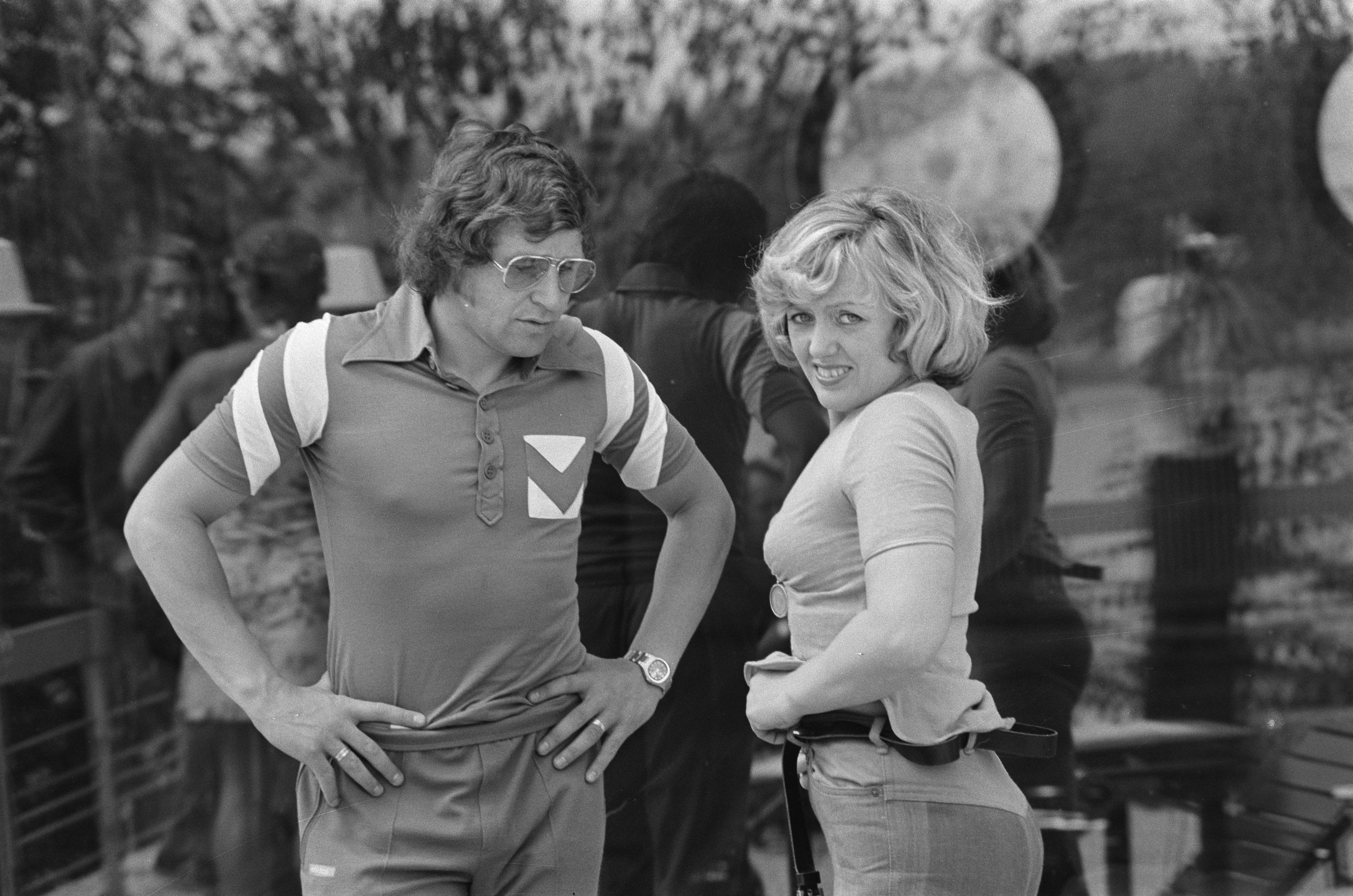 Collectie / Archief : Fotocollectie Anefo Reportage / Serie : [ onbekend ] Beschrijving : P WK 74, Nederlands elftal in Hiltrup met vrouwen; nr. 25a Israel en vrouw Datum : 24 juni 1974 Trefwoorden : elftallen, sport, voetbal, vrouwen Fotograaf : Mieremet, Rob / Anefo Auteursrechthebbende : Nationaal Archief Materiaalsoort : Negatief (zwart/wit) Nummer archiefinventaris : bekijk toegang 2.24.01.05 Bestanddeelnummer : 927-2788